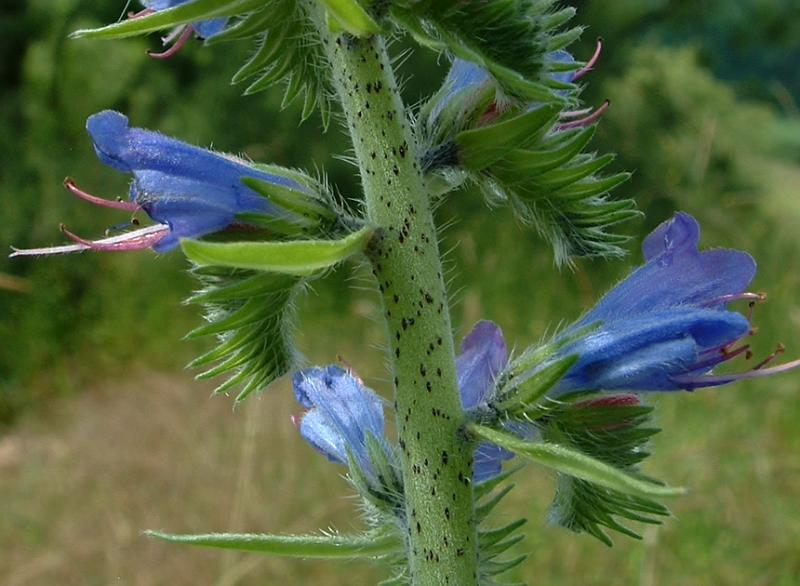 Vipérine (détail), Bucey-lès-Gy